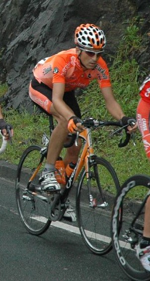 Iban Iriondo (Euskal Bizikleta 2007)